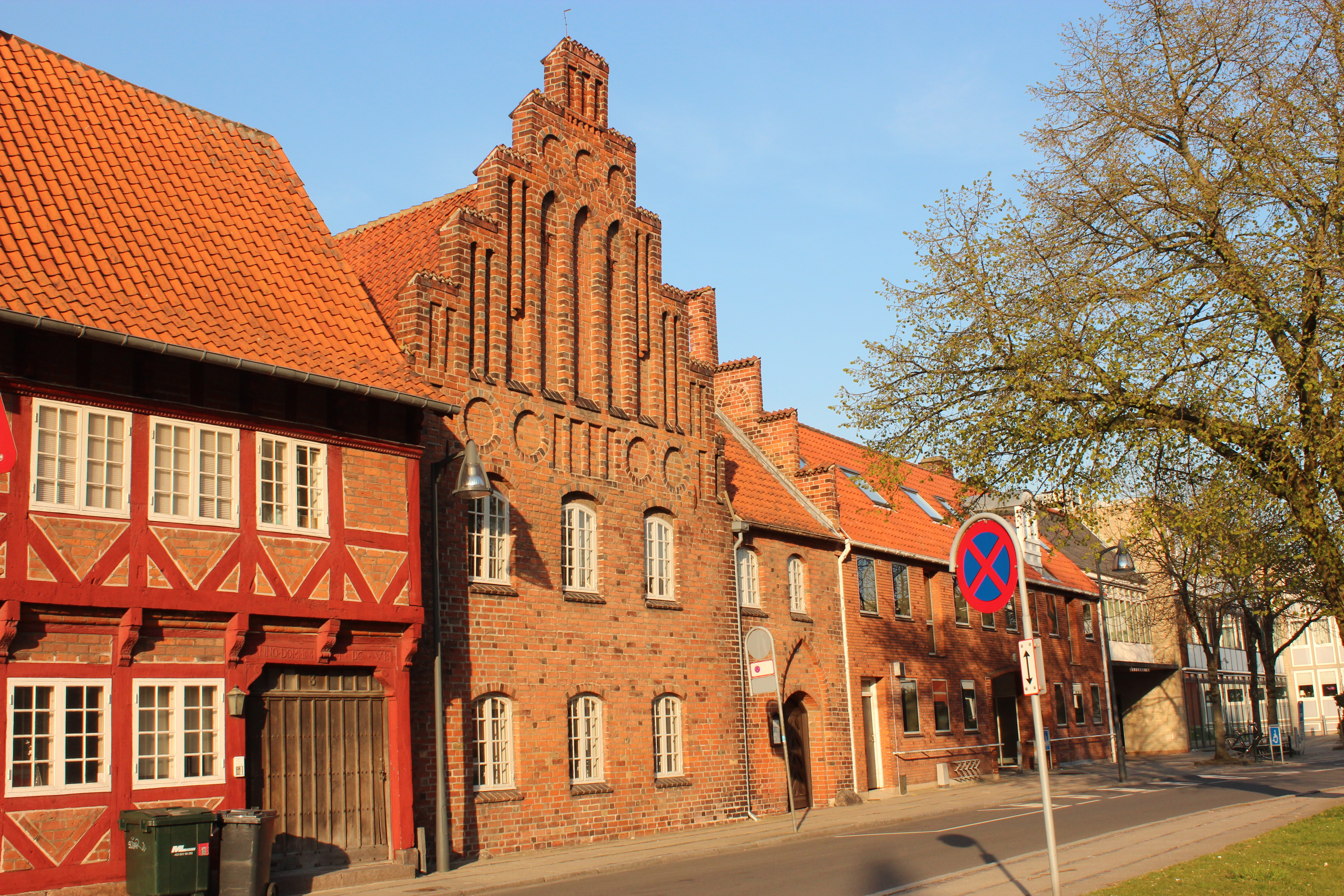 Næstved Gamle Rådhus forand Skt. Mortens Kirke.